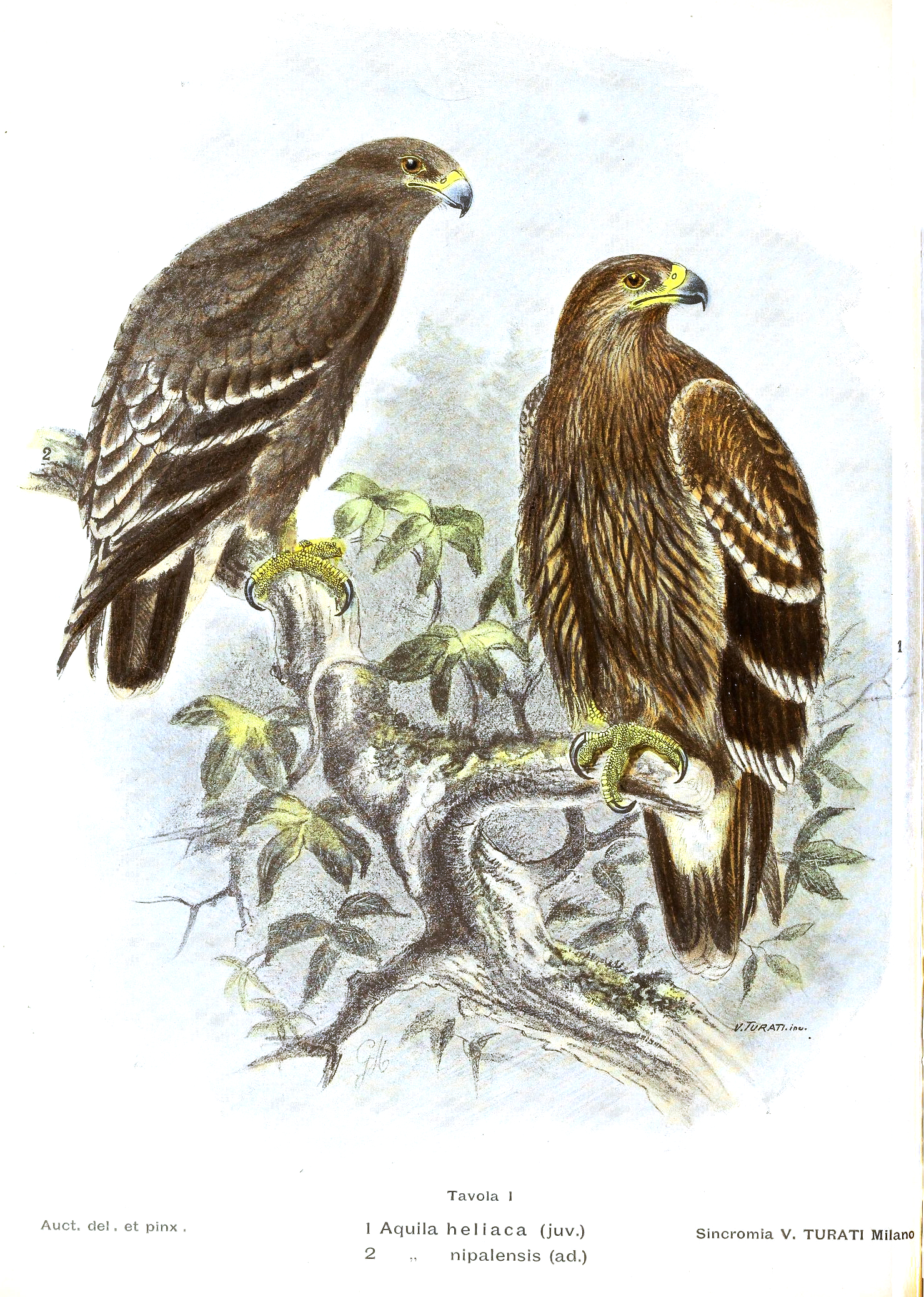 Aquila nipalensis and heliaca illustration printed using Vittorio Turati's Sincromio process